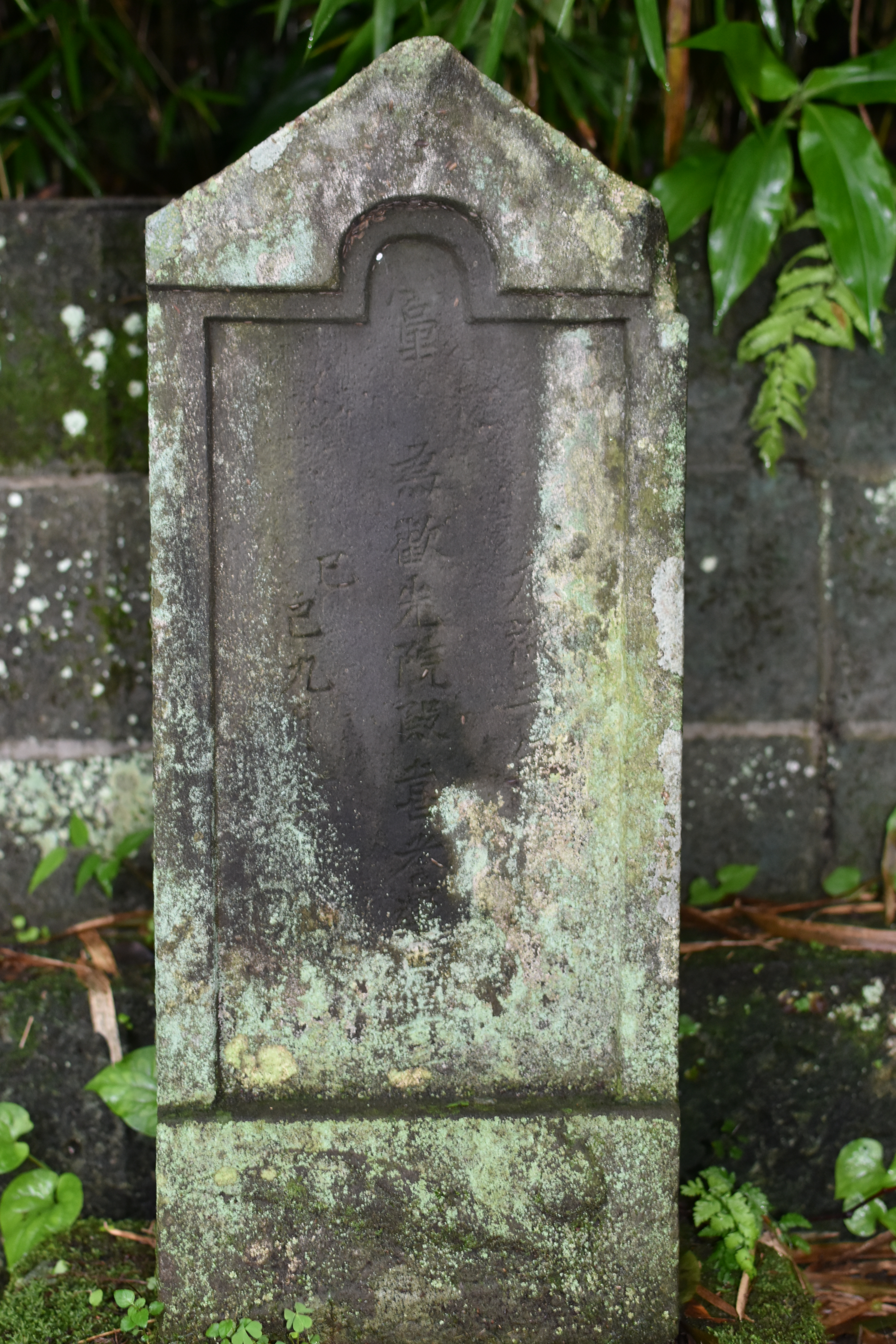 富士市兵衛信成の墓碑（横浜市栄区長尾台町、2019年7月）